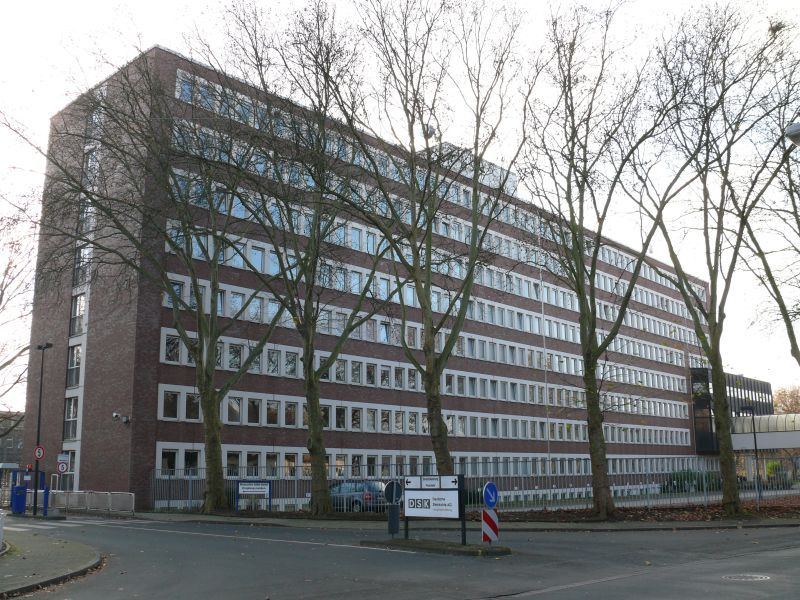 DSK Herne